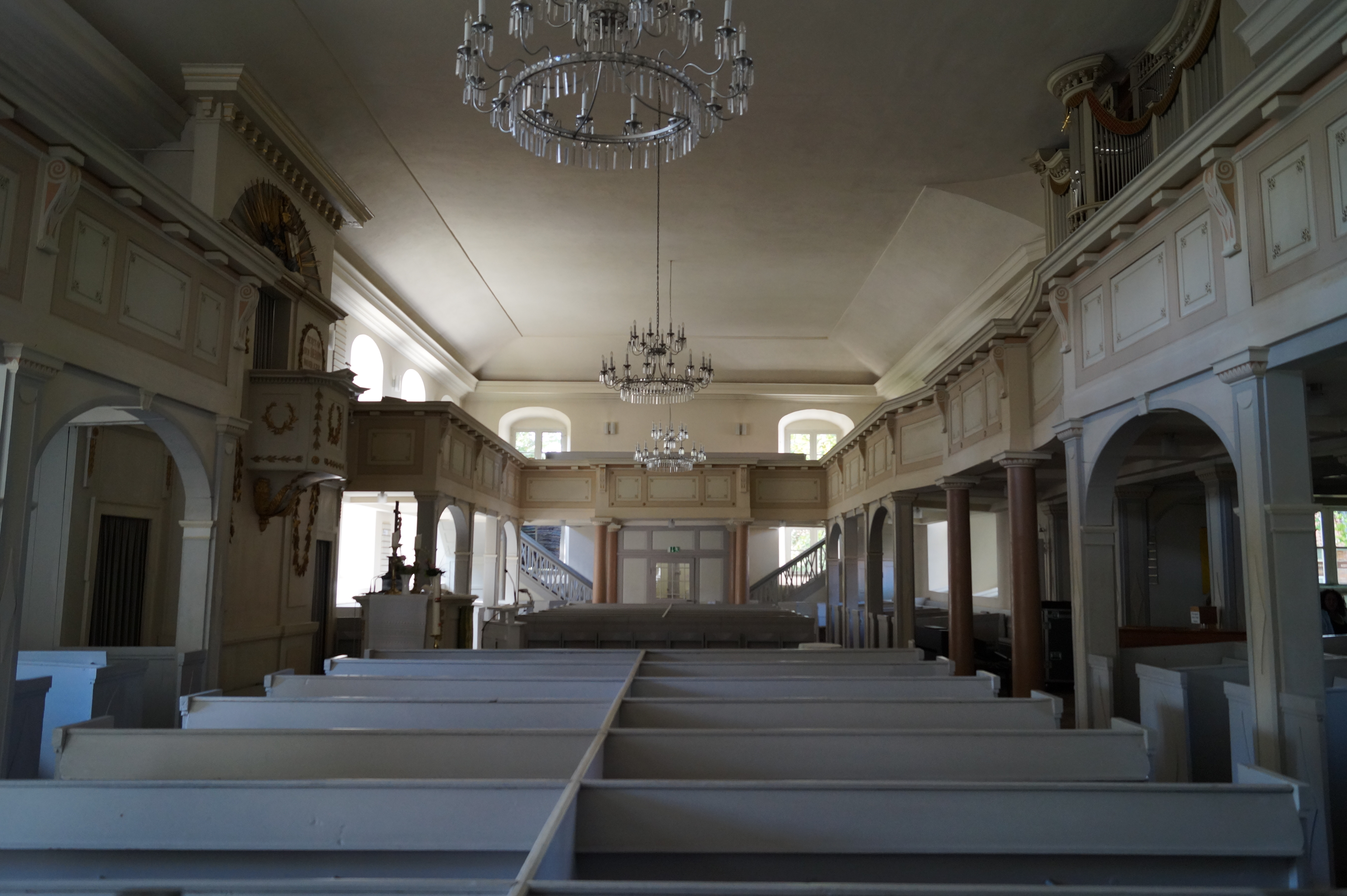 Blick in die Kirche vom Westeingang aus